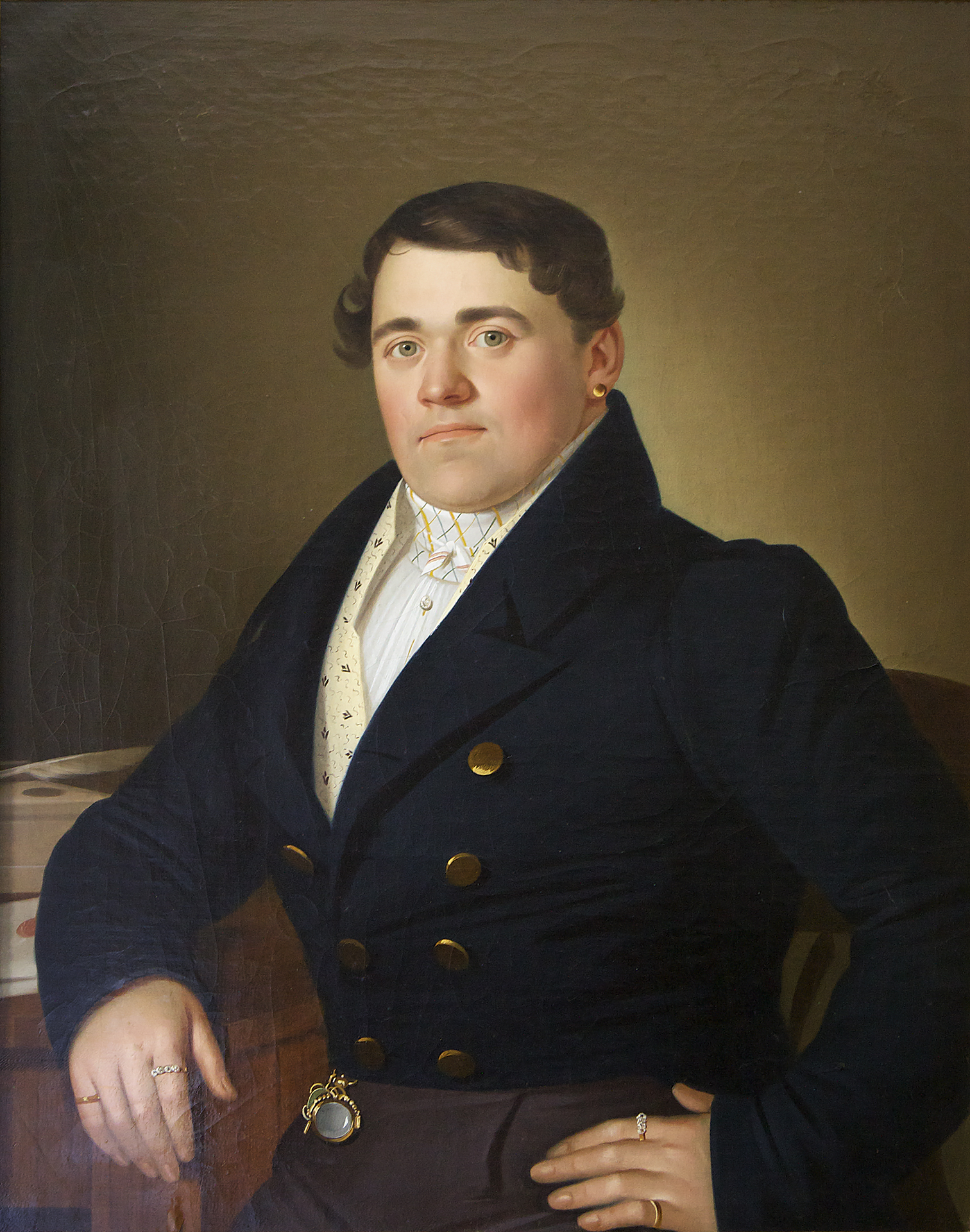 Portrait